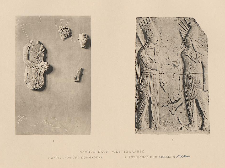 Rekonstruktion der Dexiosisreliefs von Antiochos mit Kommagene und Apollon auf der Westterrasse am Nemrut Dağı, Türkei, von Carl Humann und Otto Puchstein, 1890. Die Kommagenedexiosis (links) zeigt nur den Teil, der von Humann und Puchstein nach Berlin verbracht wurde, die einzelne Hand wurde falsch identifiziert und gehört nicht dazu.